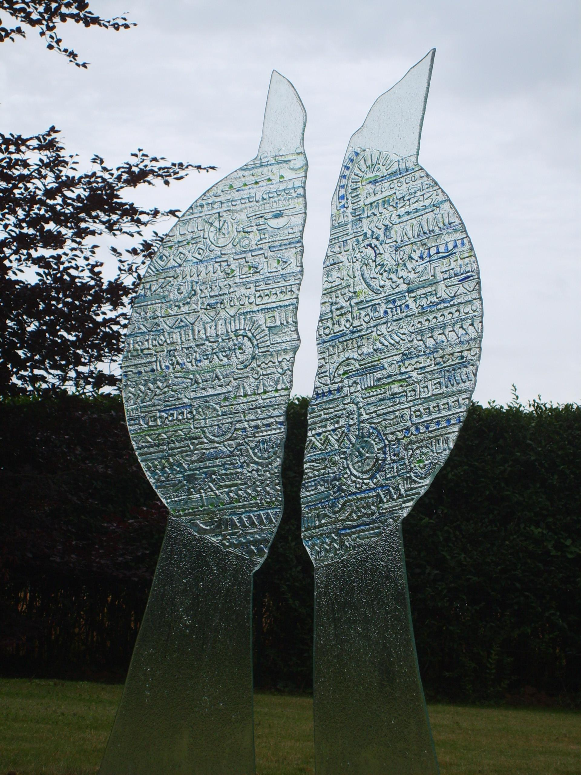 Une sculpture en bas-relief de verre : création de Carlo Roccella.